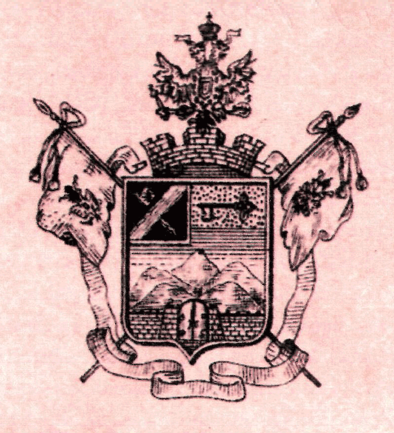 Изображение герба на бланке владикавказского городского секретаря (1897)